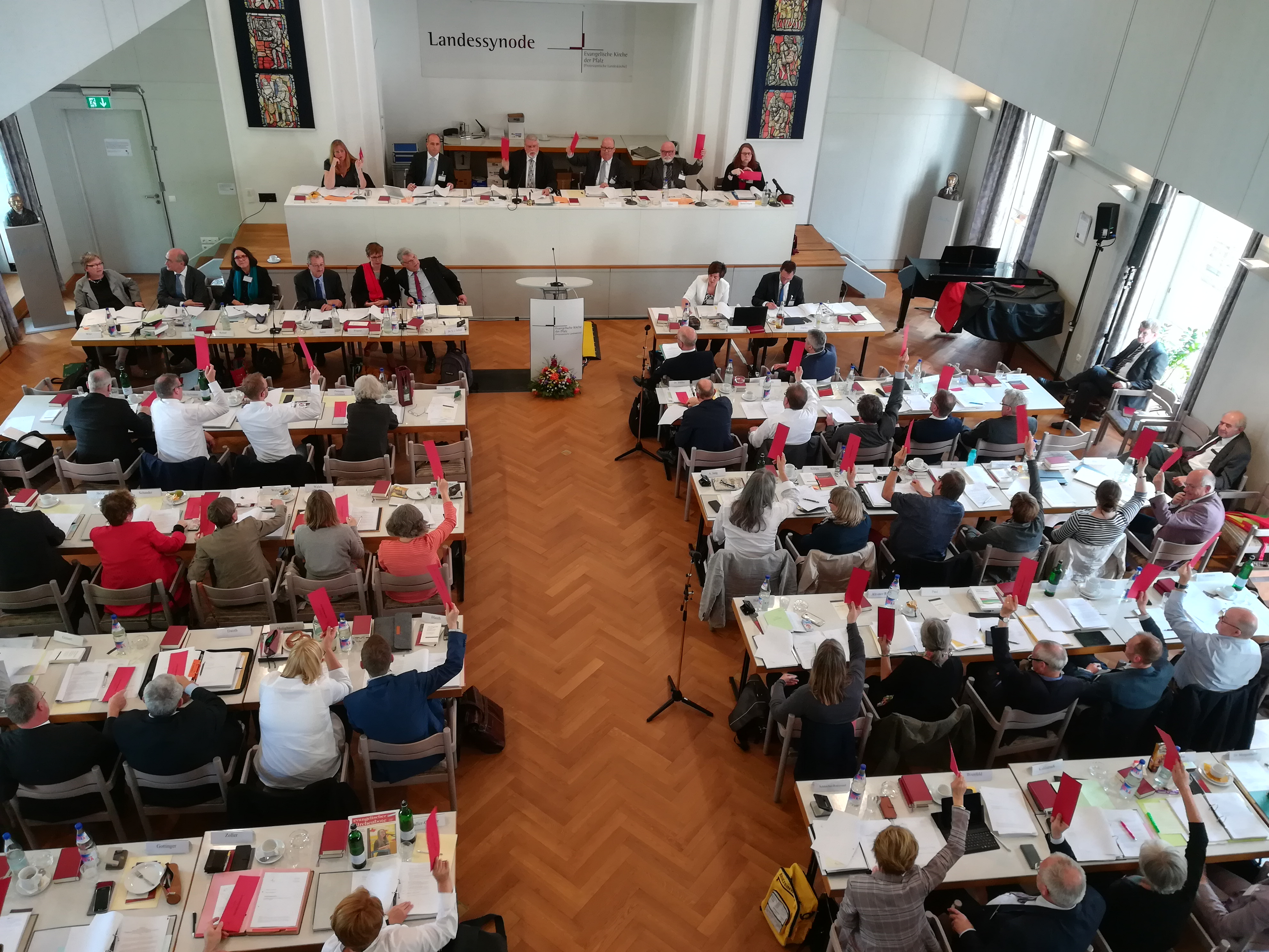 Landessynode der Evangelischen Kirche der Pfalz während einer Sitzung